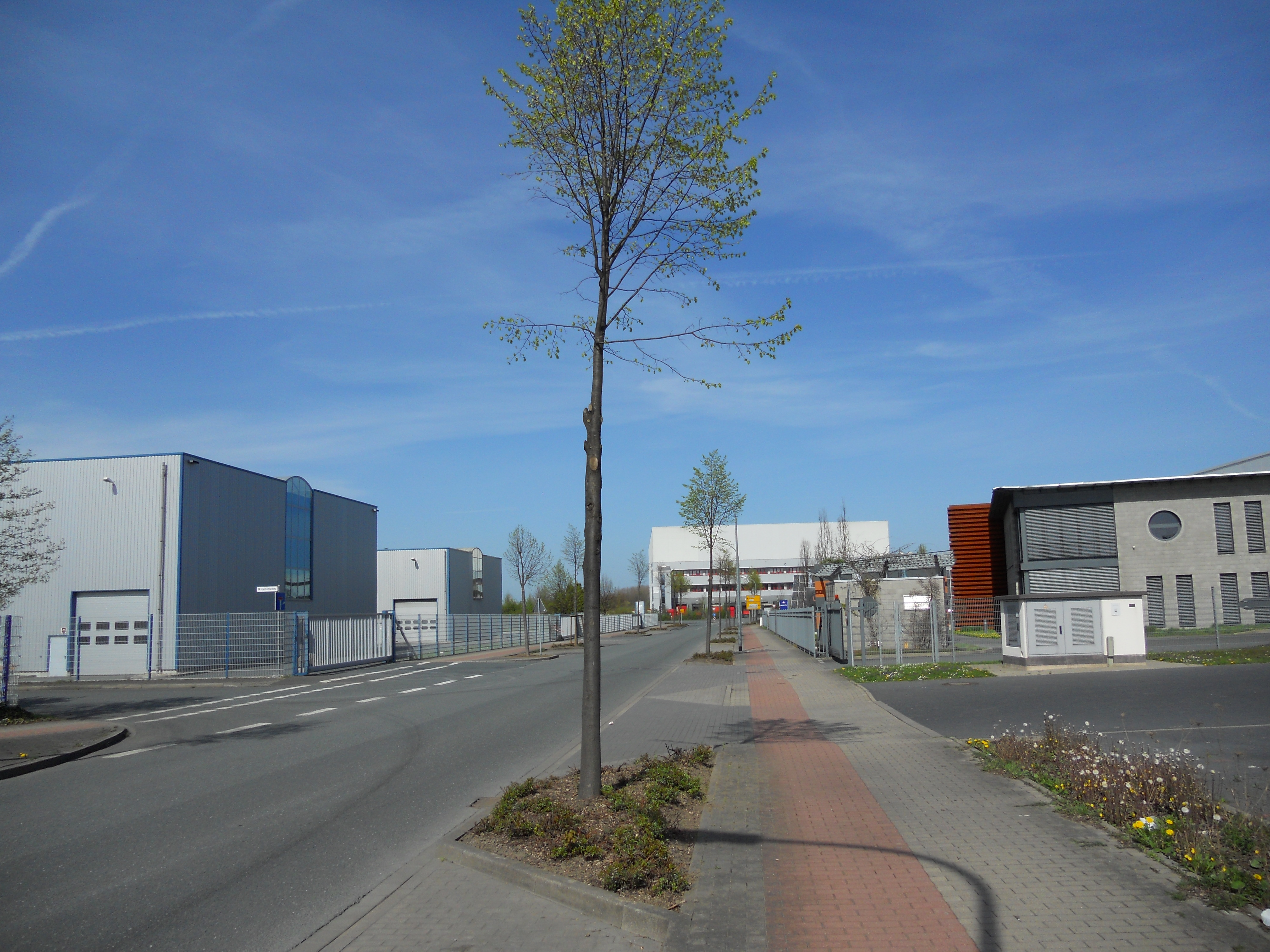 Ansicht KonWerl 2010